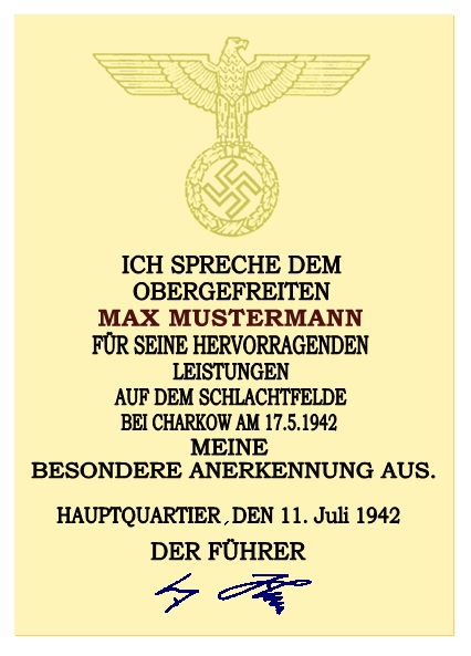 Anerkennungsurkunde des Oberbefehlshaber des Heeres für ausgezeichnete Leistungen auf dem Schlachtfeld